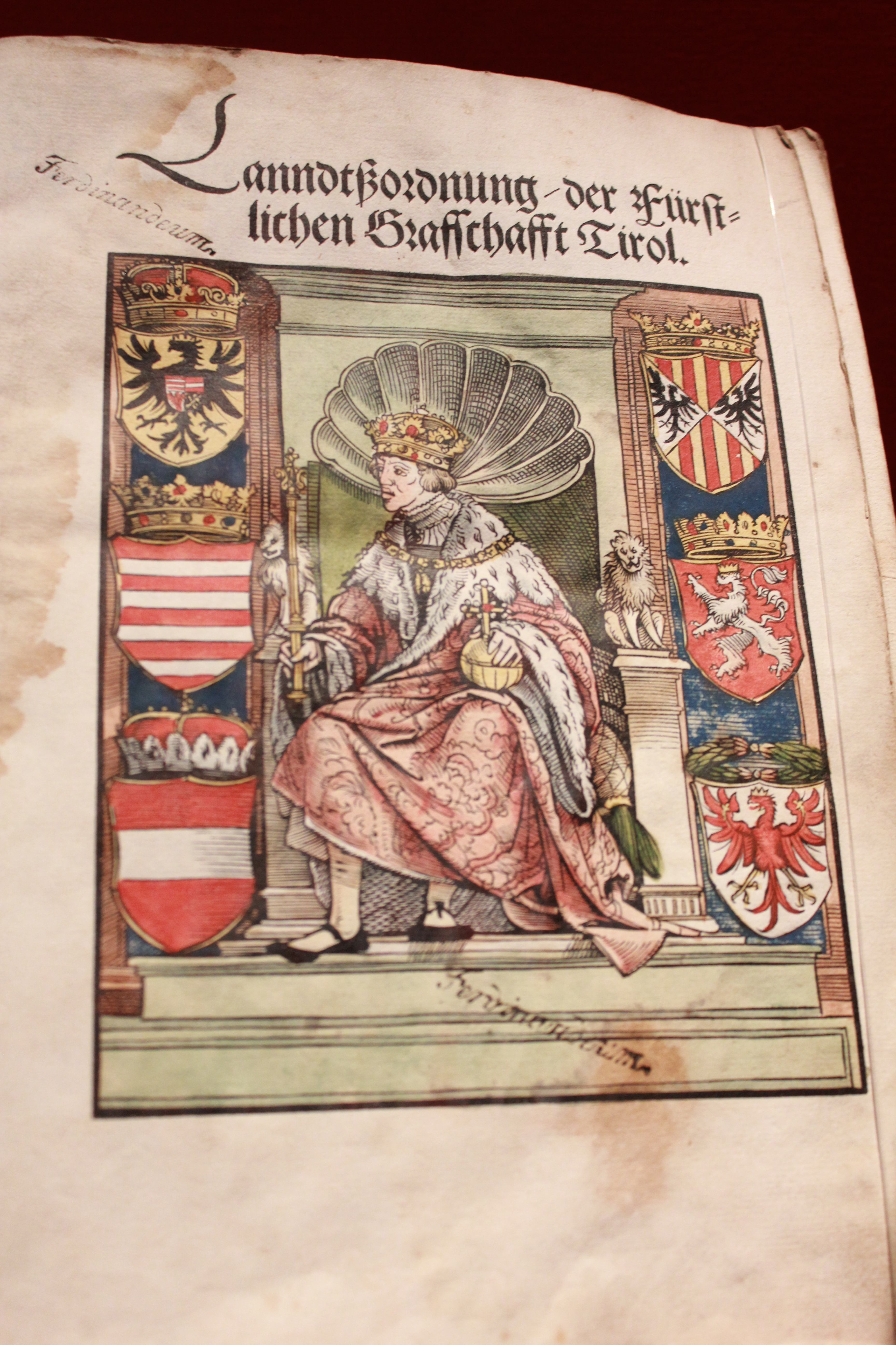 Landesordnung der Fürstlichen Grafschaft Tirol von 1526. Mit kolorierter Holzschnittdarstellung Erzherzog Ferdinands I., der damals auch Graf von Tirol war. Ausgestellt im Museum im Zeughaus in Innsbruck.